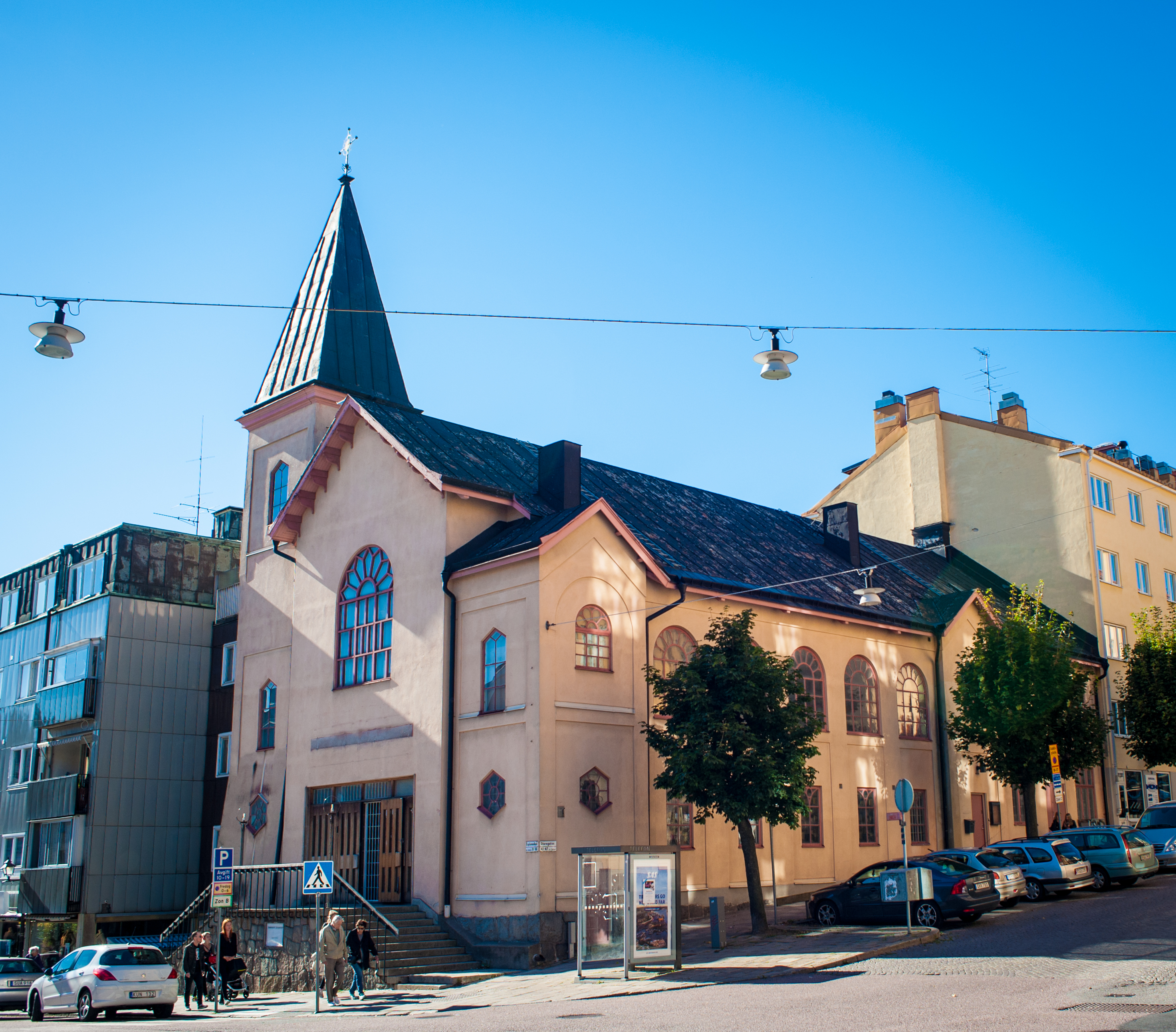 Det Nya Museet ligger i en, sedan 2005 avkristnad baptistkyrka i Sundbyberg.